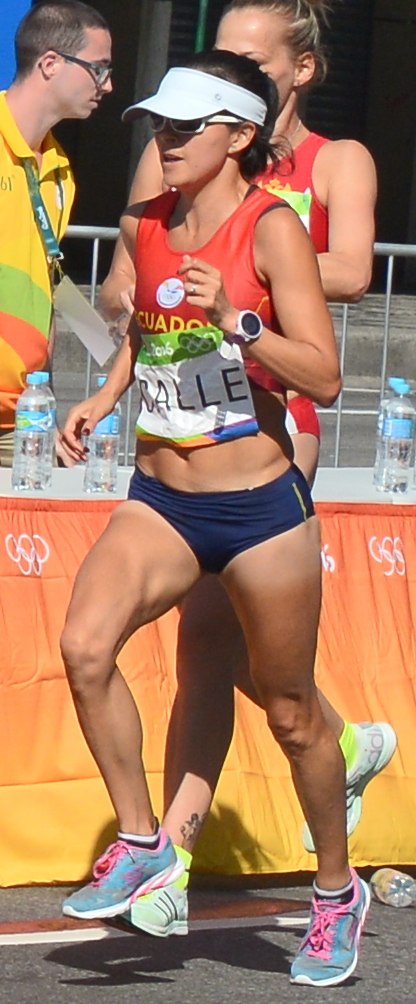 Passage du marathon des jeux olympiques de Rio 2016 dans le centre de Rio